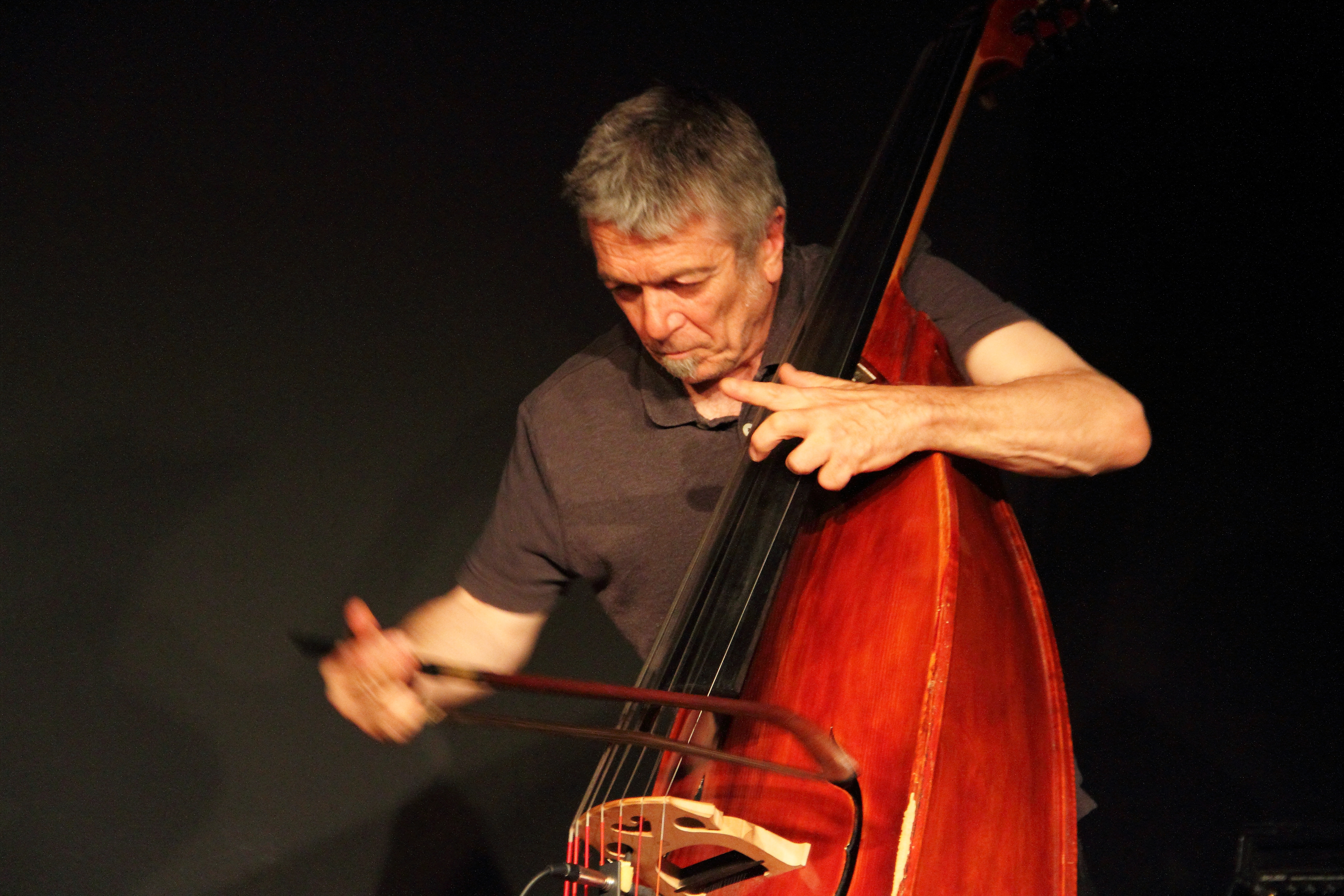 Konzert mit ROPE im KULT in Niederstetten. Eine Zusammenarbeit des Club W71 mit dem Kulturamt Niederstetten, ROPE sind: Uwe Oberg (Klavier) - Frank Paul Schubert (Sopransaxophon) - Paul Rogers (7-saitiger Bass) & Mark Sanders (Schlagzeug).